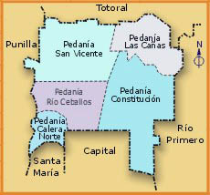 Pedanías